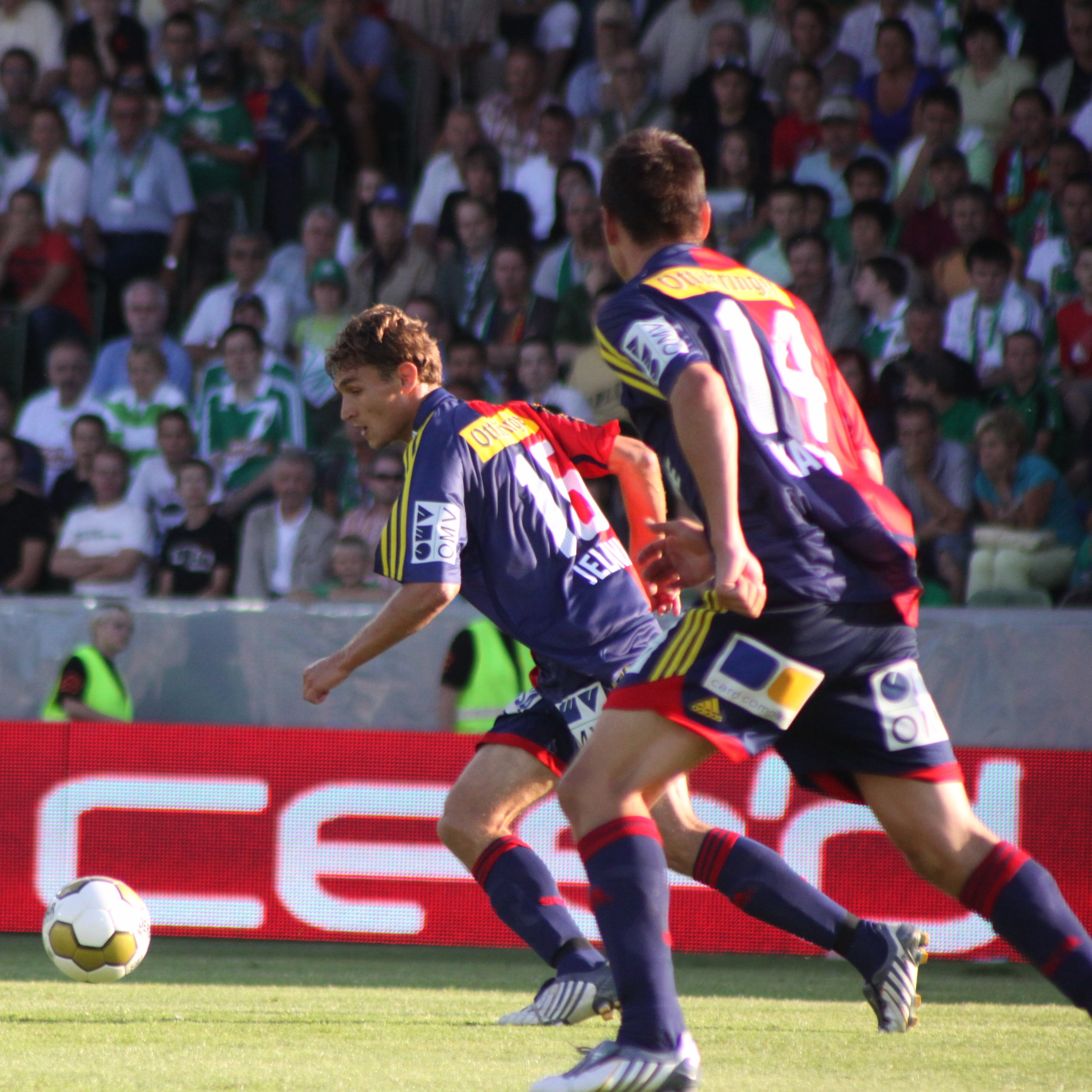 Nikica Jelavić - SK Rapid Wien (3)